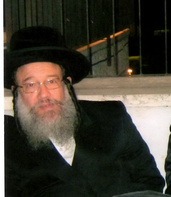 שלמה גולדמן